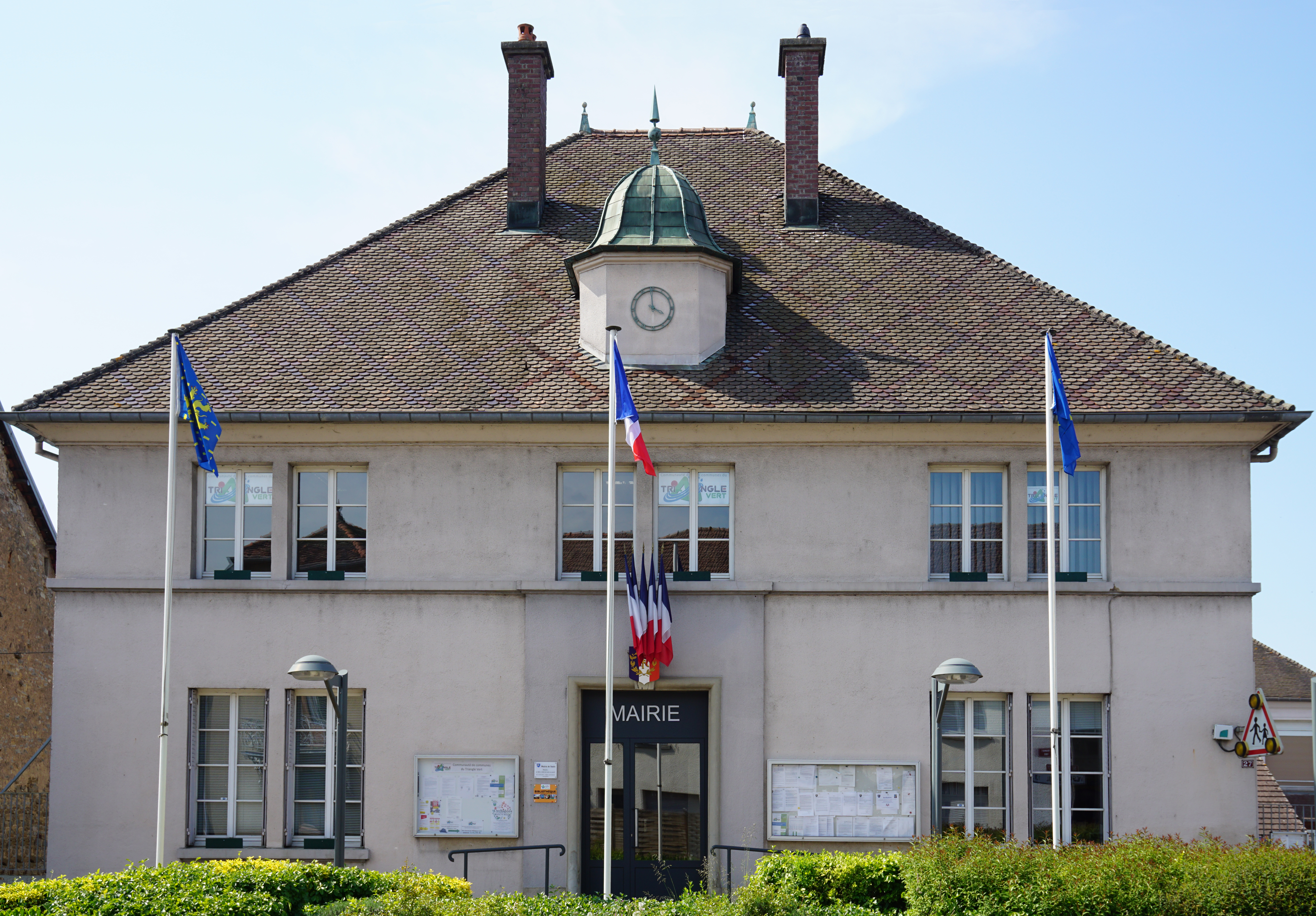 Mairie de Saulx (Haute-Saône).